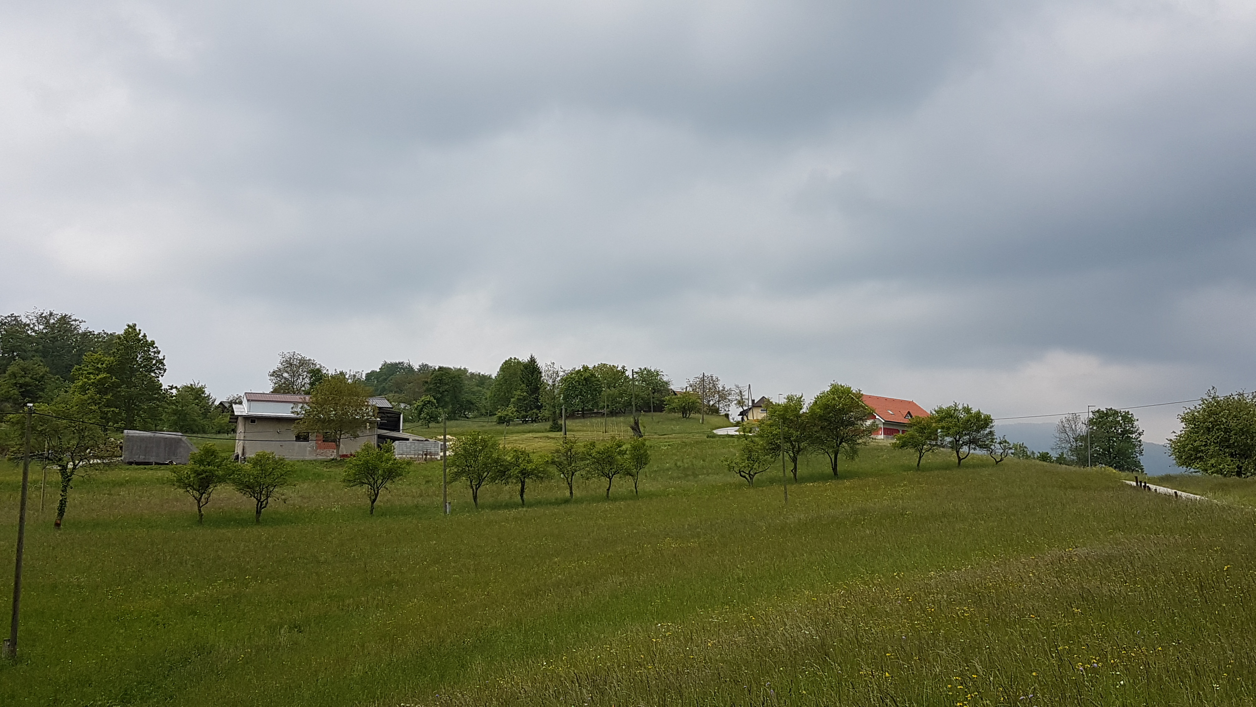 Naselje Plesko na hribu v hrastniški občini